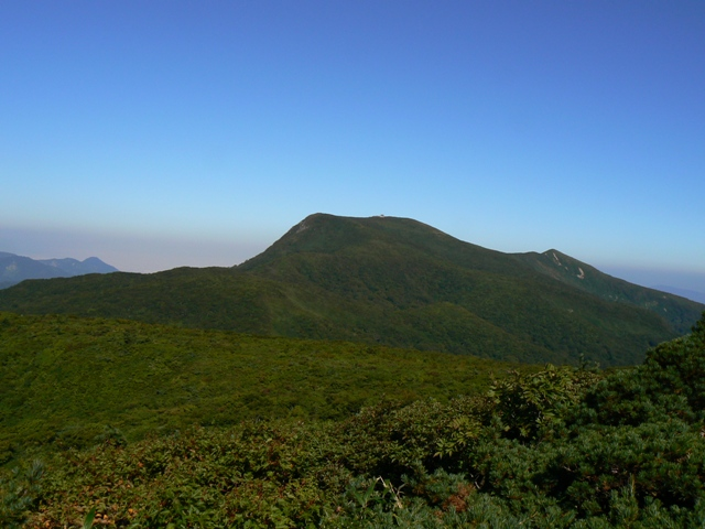 船形山 Mt. Funagata 1500mH